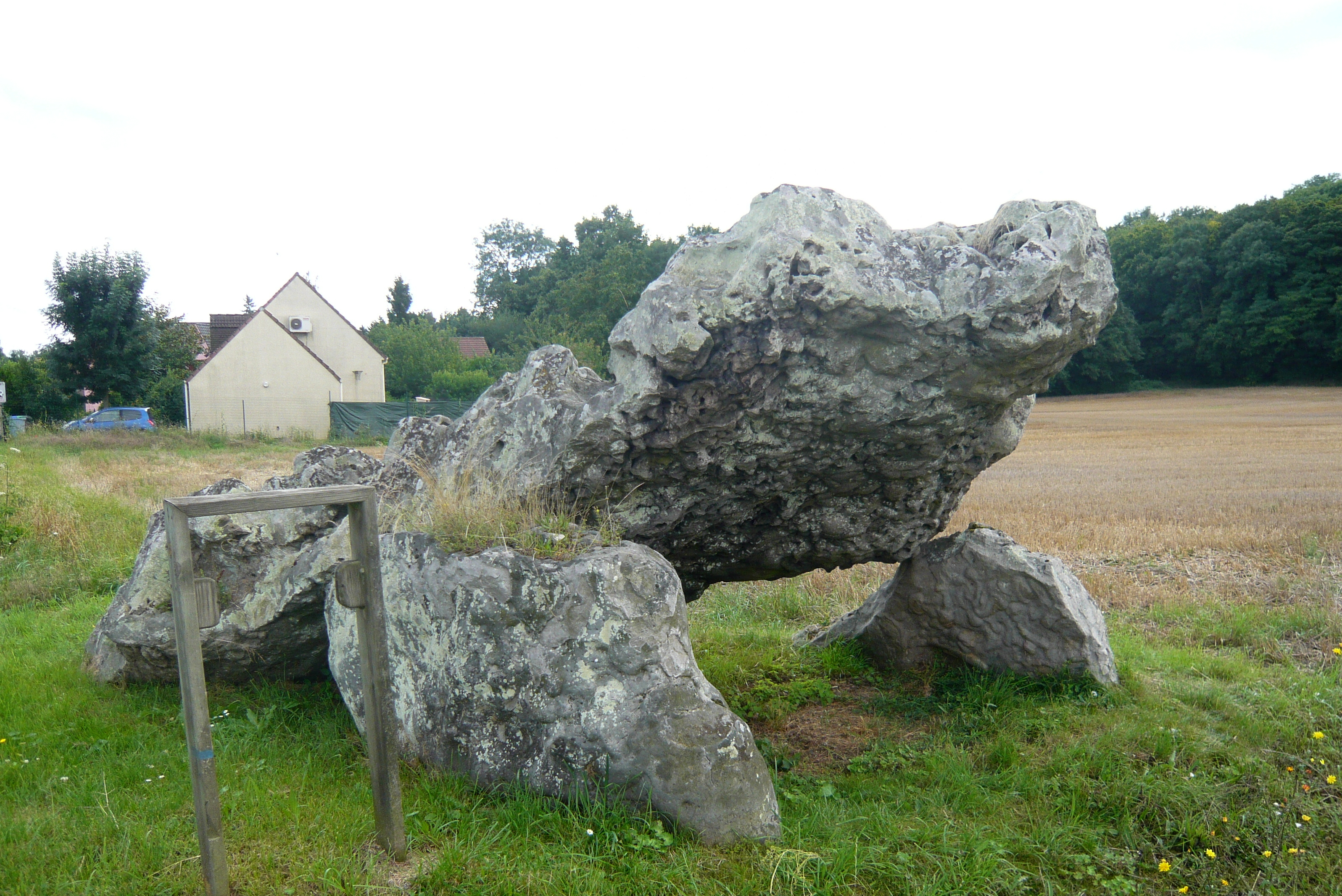 Dolmen de la Grenouille, Changé, Saint-Piat, Eure-et-Loir (France).